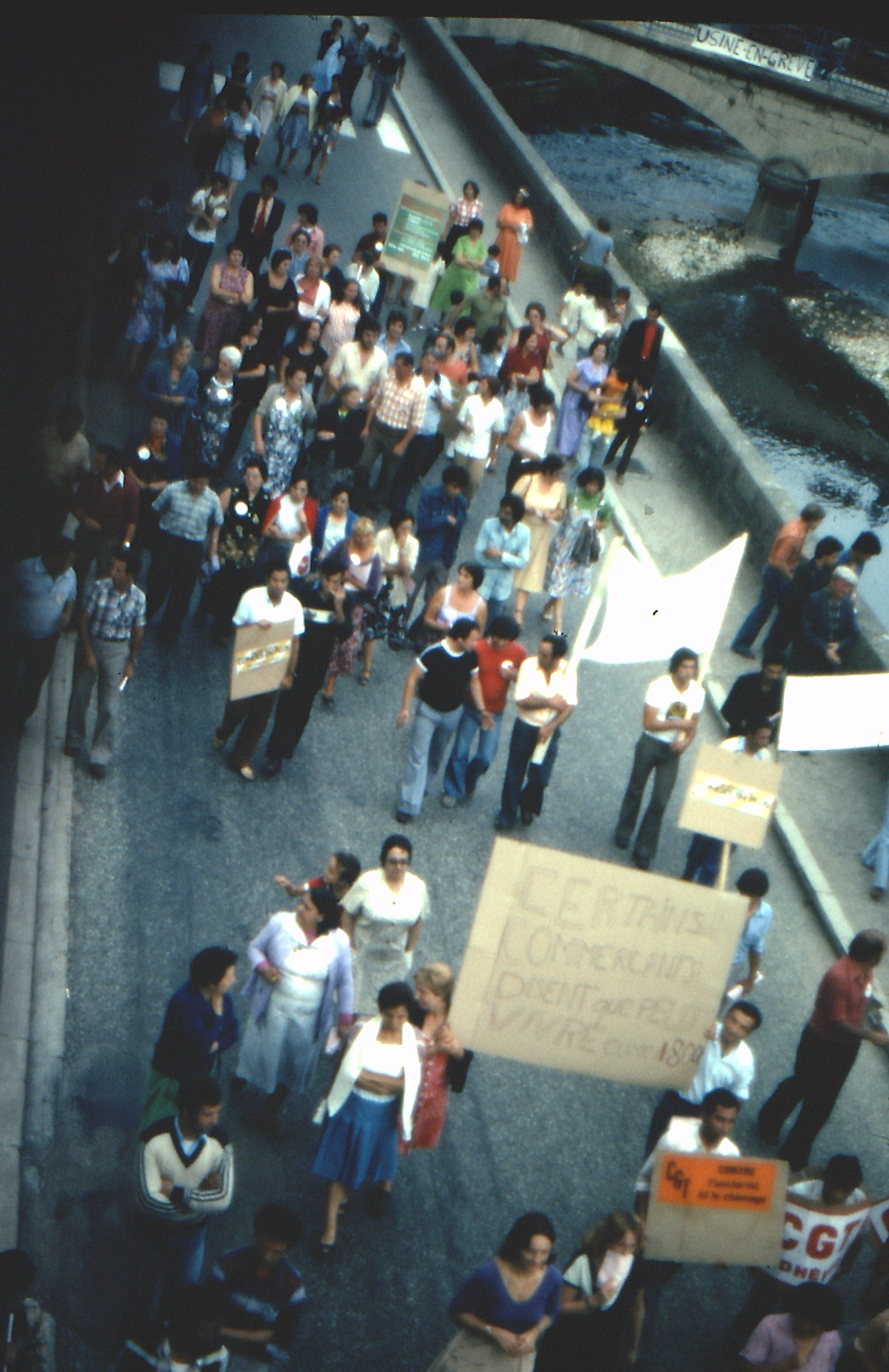 Grève et manifestation des ouvriers de la Schappe de Saint Rambert-en-Bugey, 1979